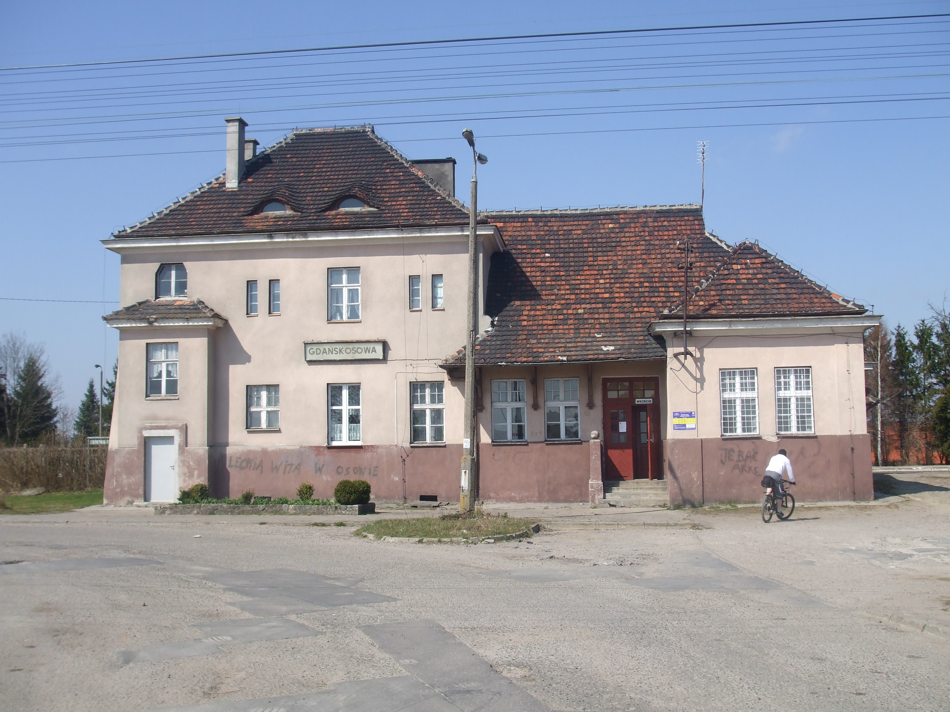 Gdańsk Osowa. Dworzec kolejowy.